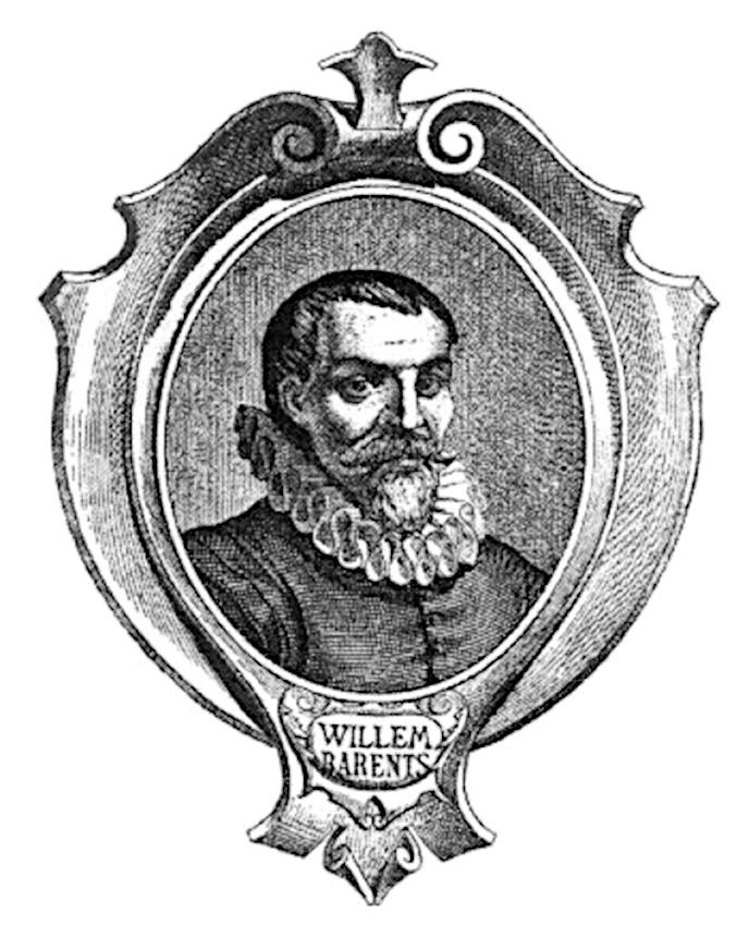 Willem Barentsz, portret. 16e/17e eeuws, dus vrij van auteursrechten /Portrait engraving of Willem Barents, a Dutch explorer.